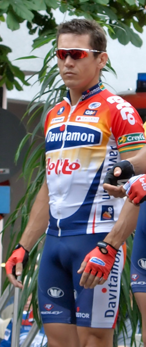 Robbie McEwen at Sparkassen Giro Bochum